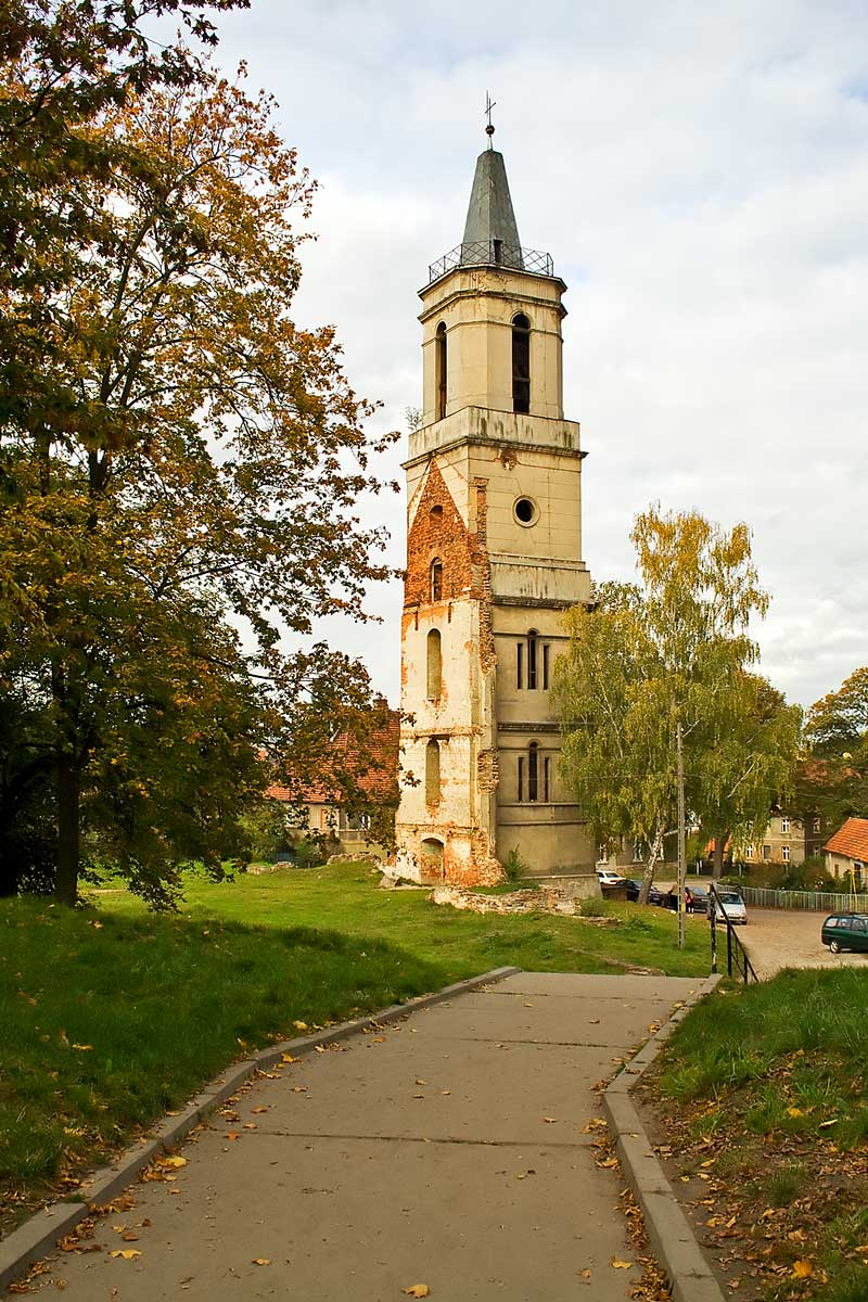 Kożuchów-wieża kościoła ewangelickiego